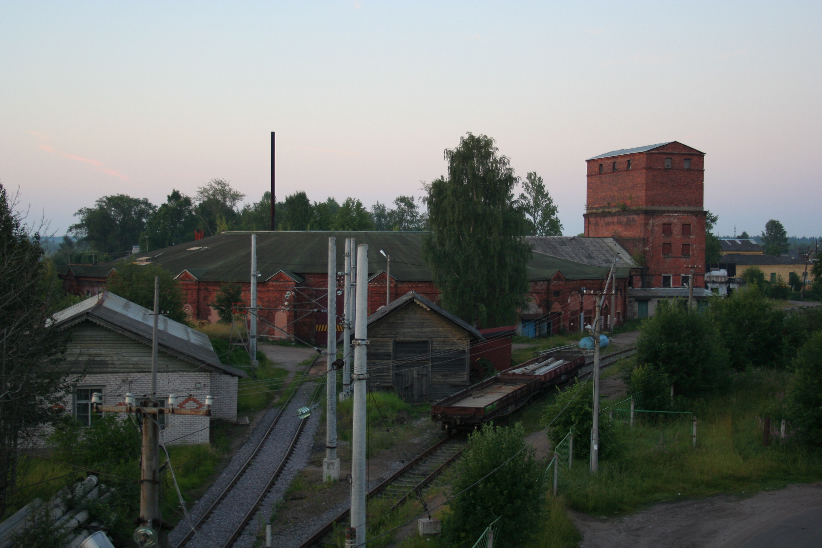 Stadt Okulowka (Oblast Nowgorod, Russland). Ehemaliges Eisenbahndepot.